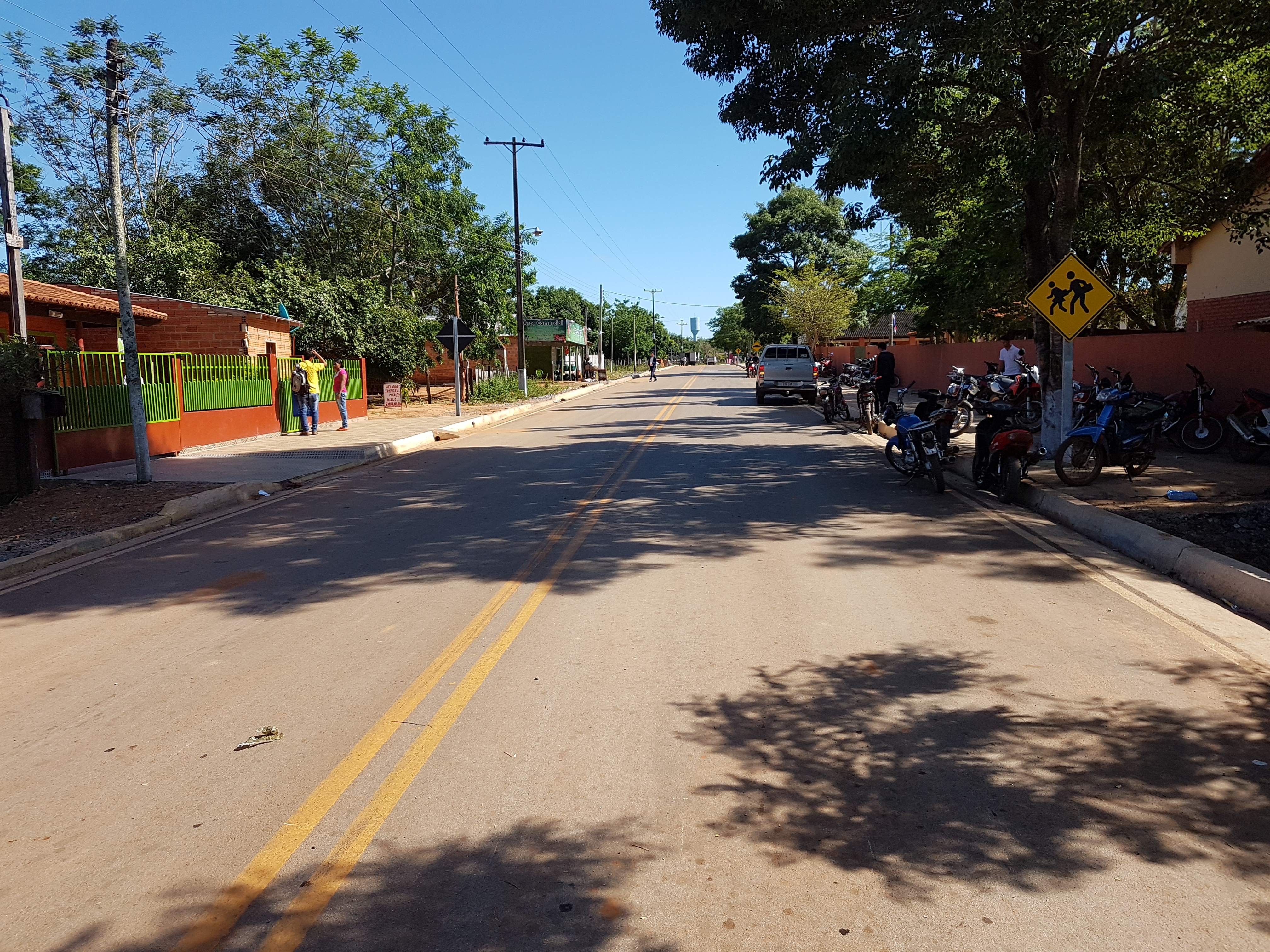 Centro de San Alfredo